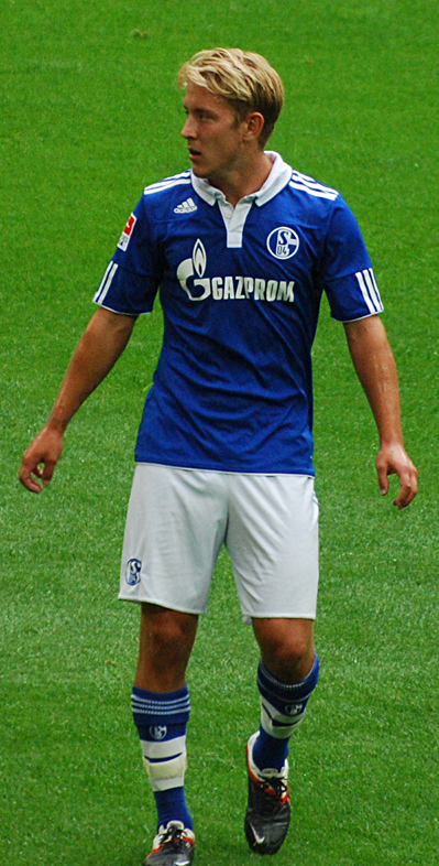 Lewis Holtby, Spieler des FC Schalke 04